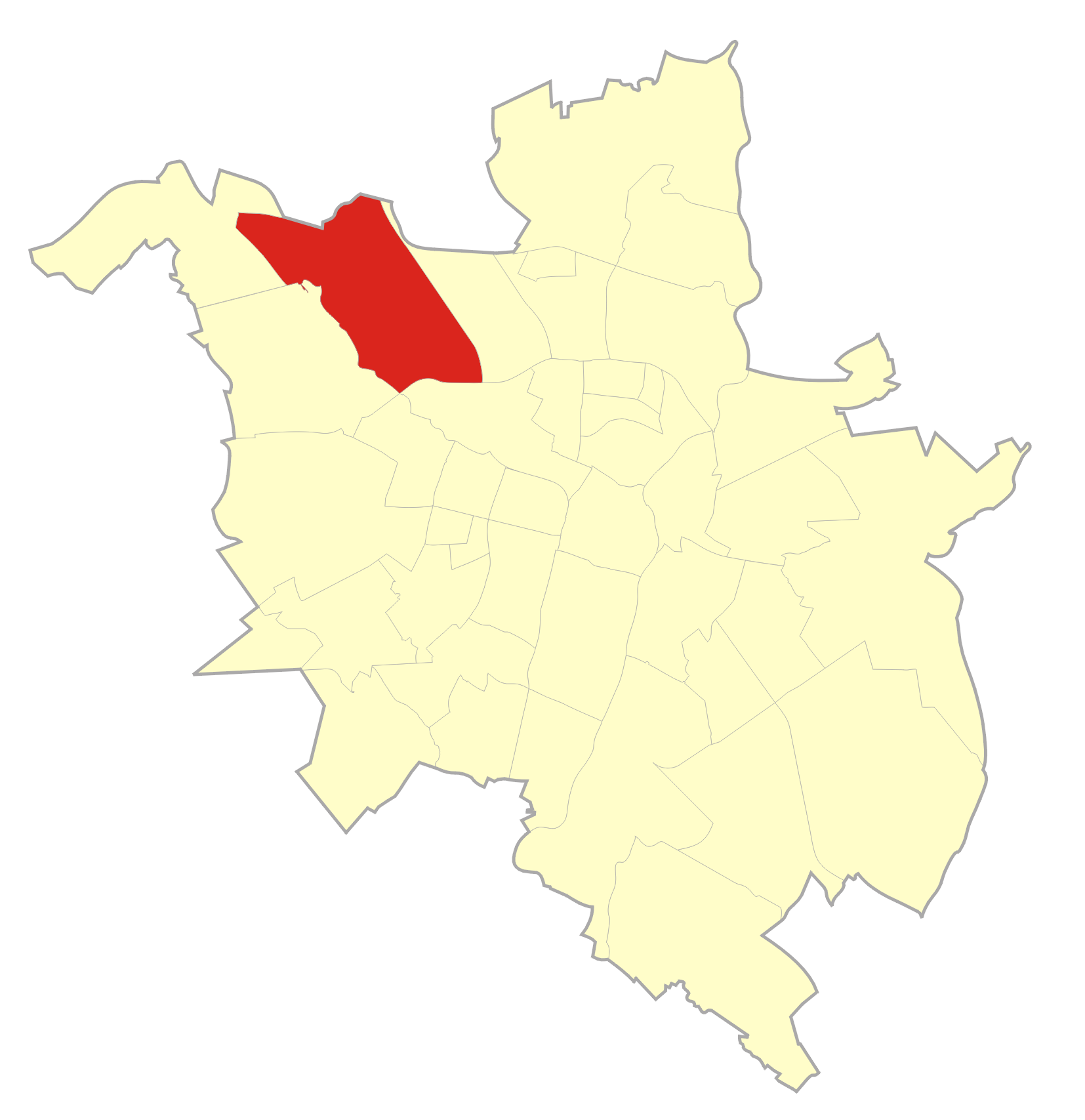 Osiedle Strzeszyn - jednostka pomocnicza Poznania od 2011 r.